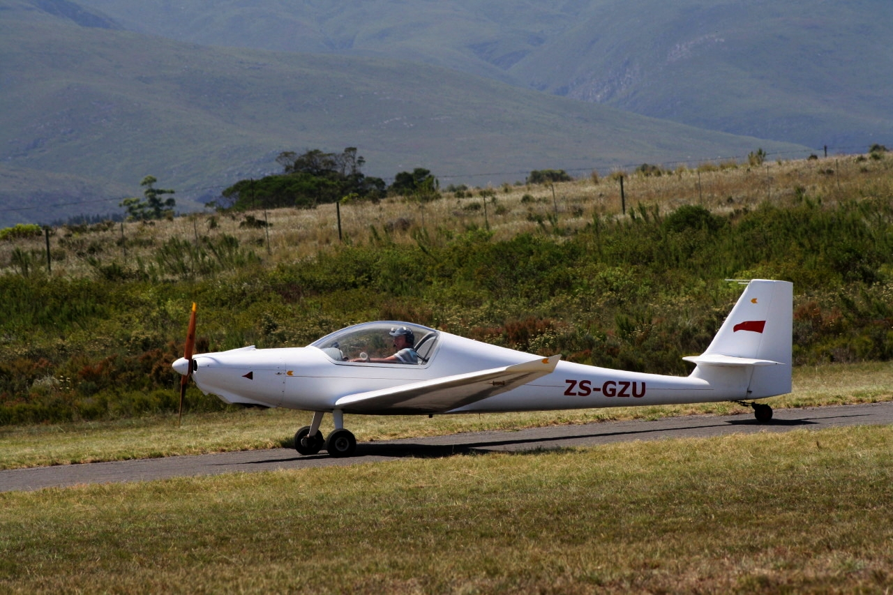 Whisper ZS-GZU